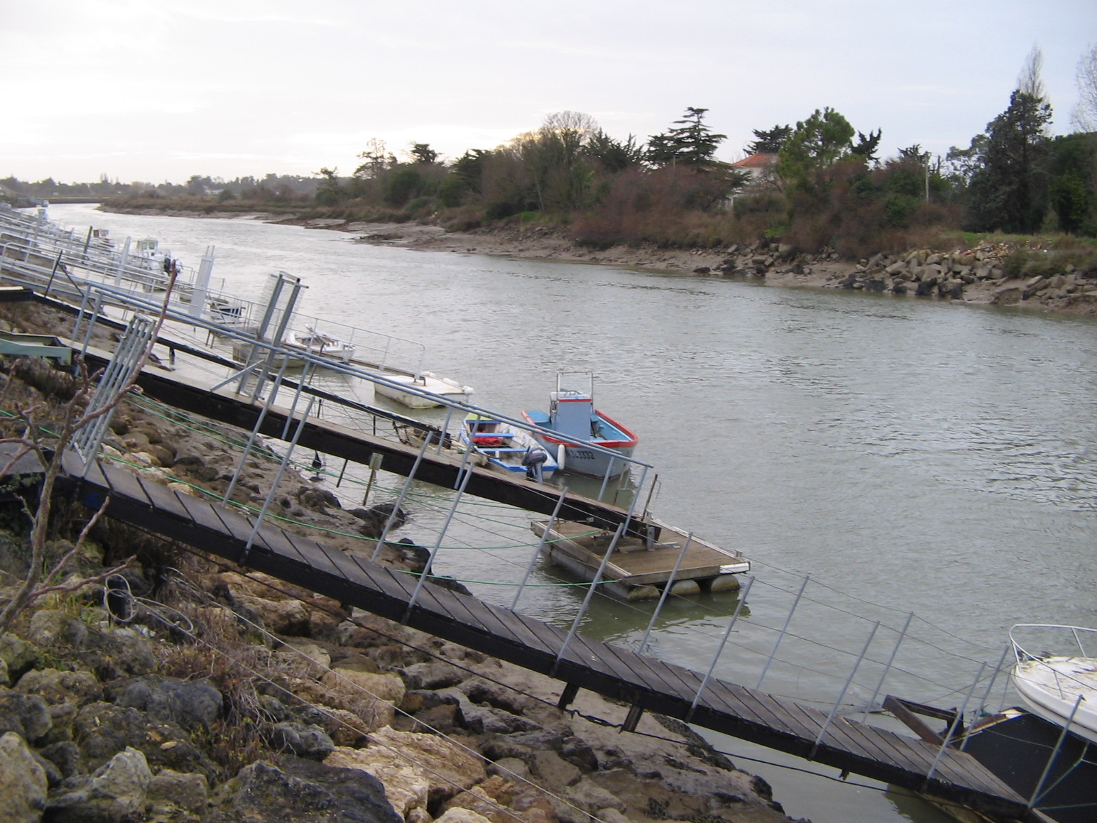 Boyardville sur l'ile d'Oléron (17)